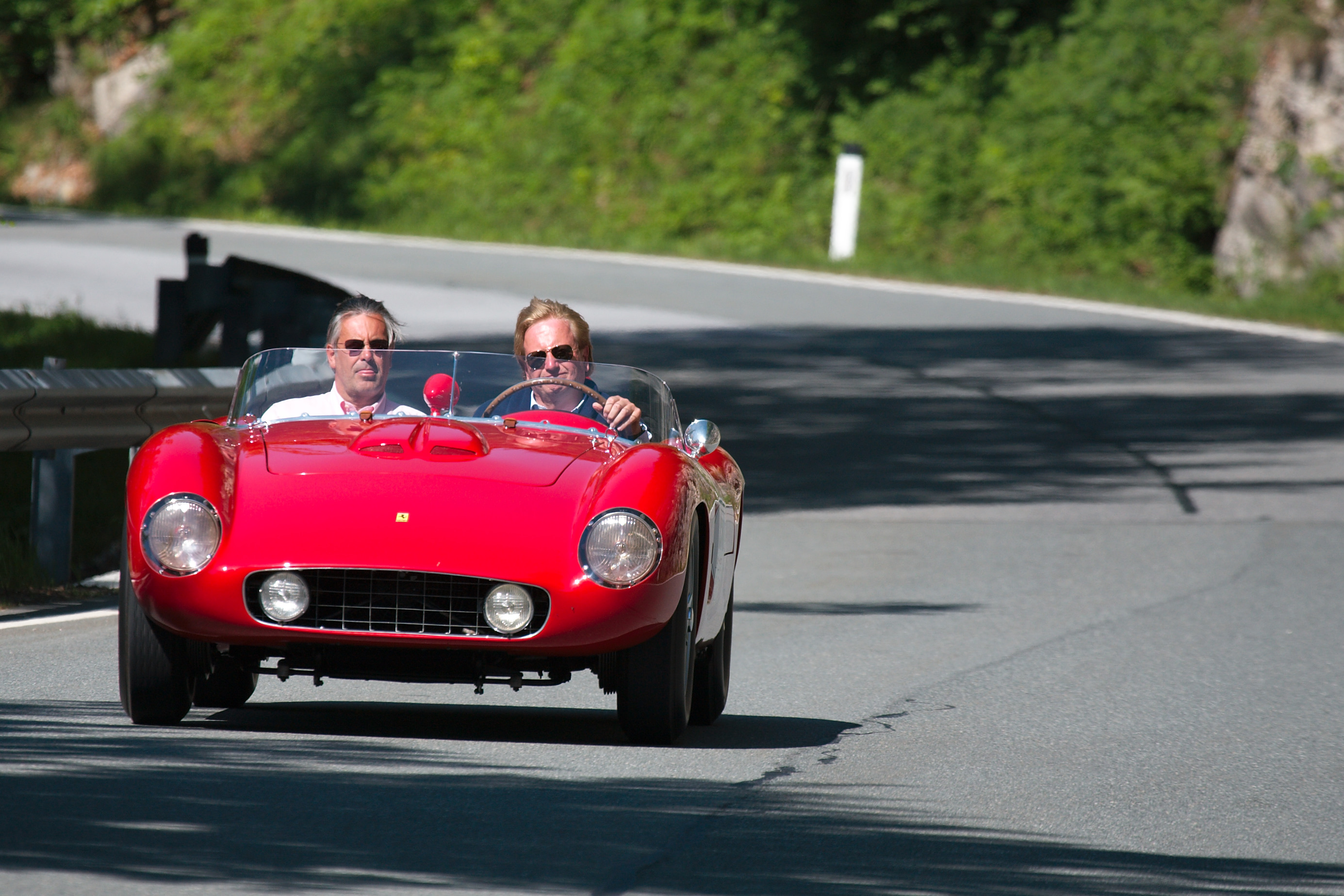 Ferrari 500 TR s/n 0620 MDTR